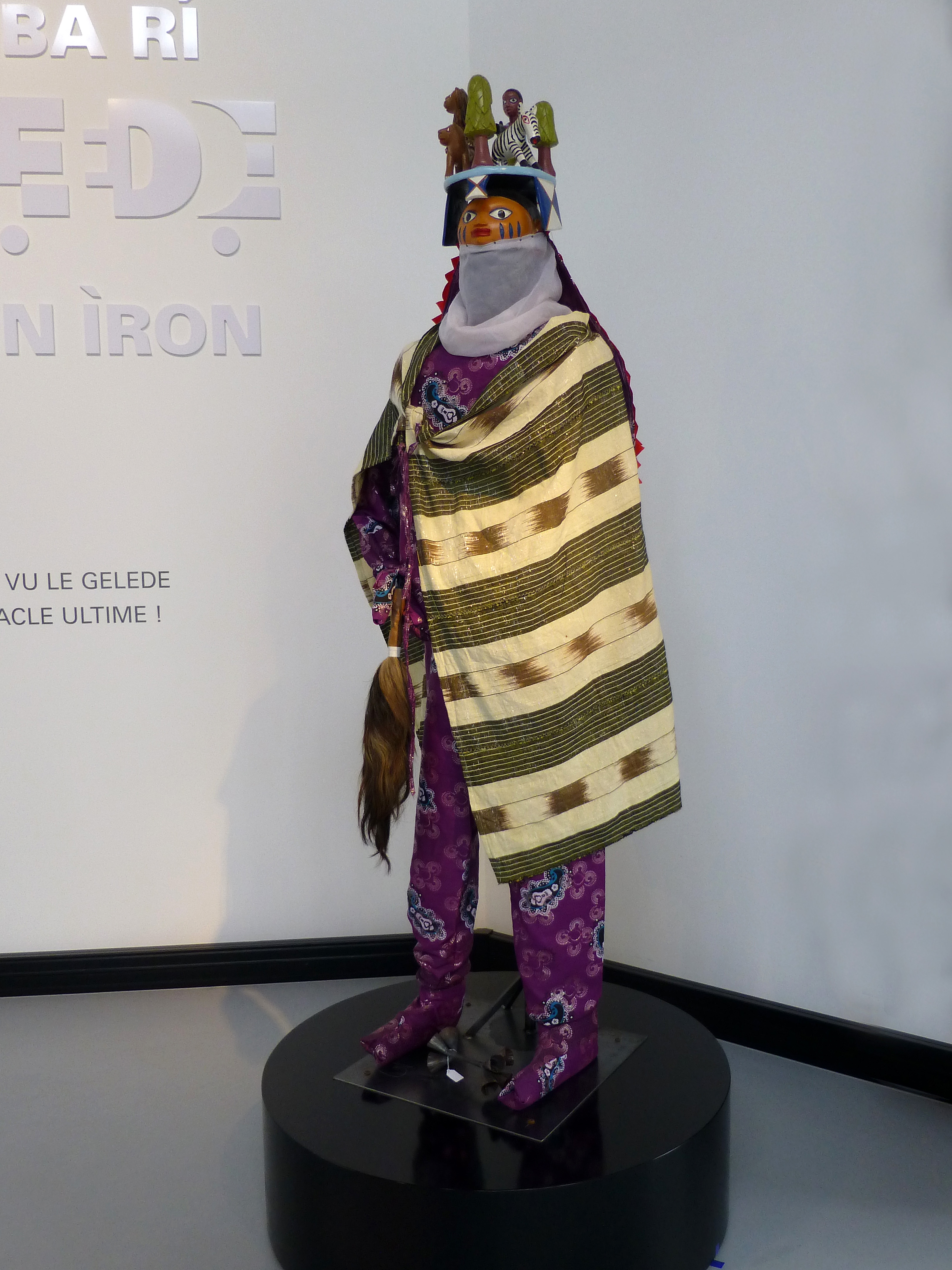 Musée Vodou (Strasbourg) : masque-costume Gèlèdè ; population Nago-Yorouba, Bénin, 2013.